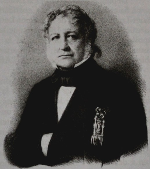 Le baron Jacques-François Roger (1787-1849), gouverneur du Sénégal et député du Loiret.